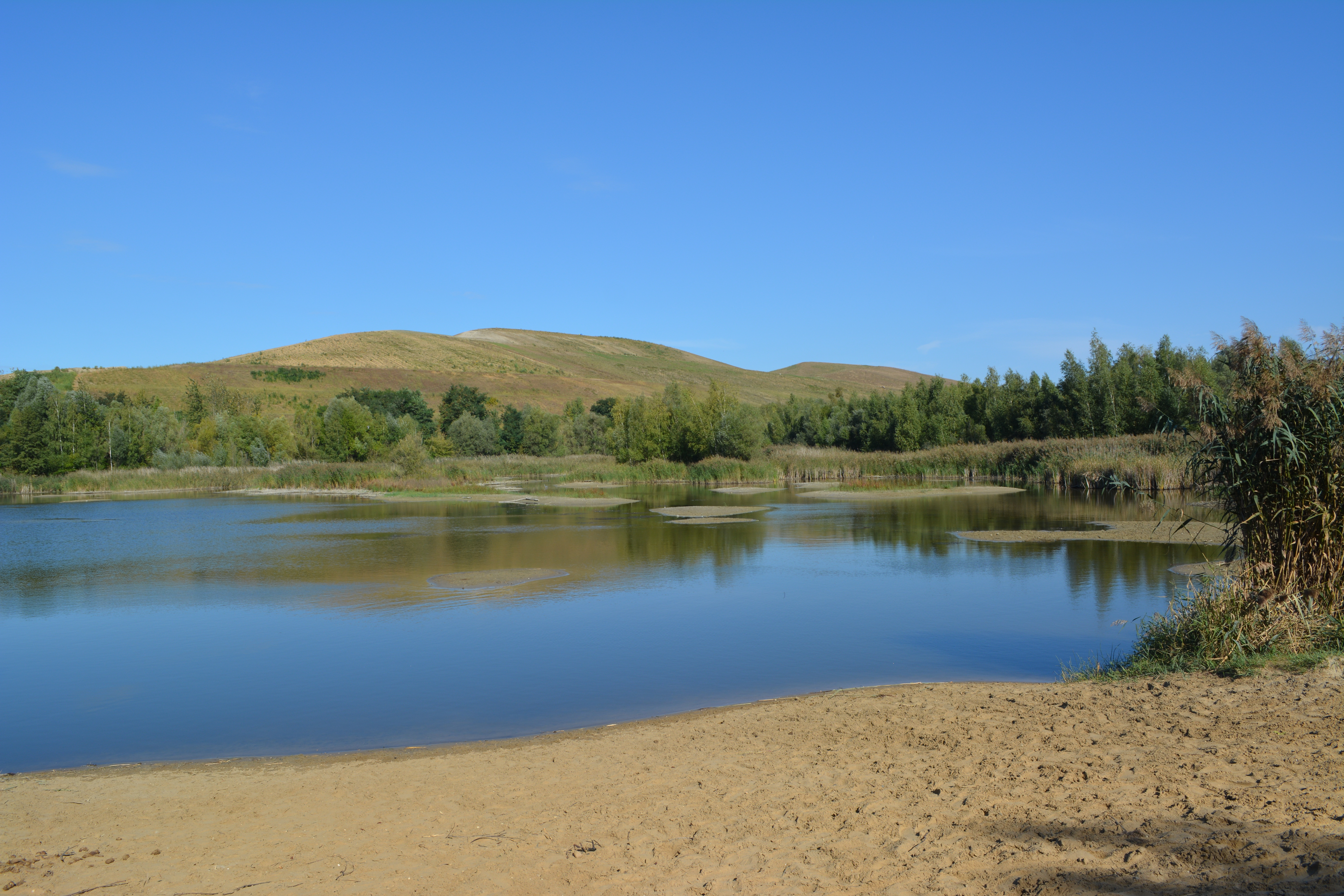 Blick vom Südufer des Kleinen Arkenberger Kiessees (Biotopsee) auf Arkenberge (Stand September 2016)